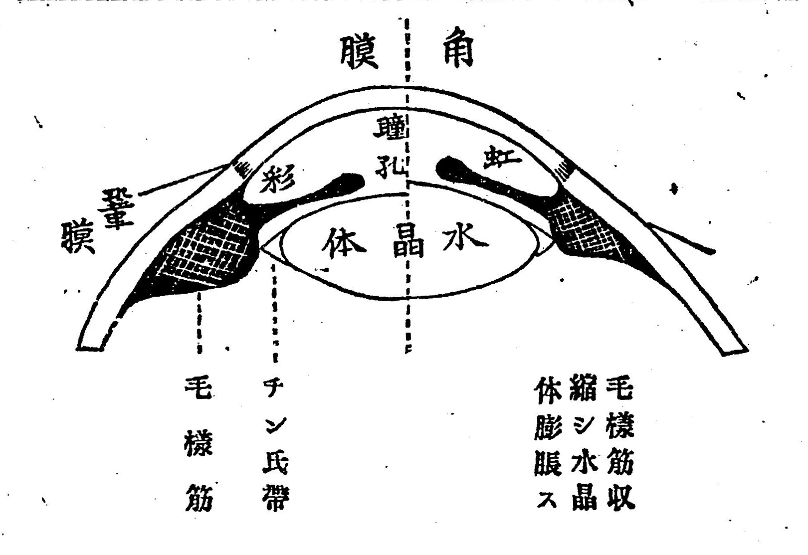 丸尾瞭益閲、美甘光太郞述『學校近視談』復明館、1897年。